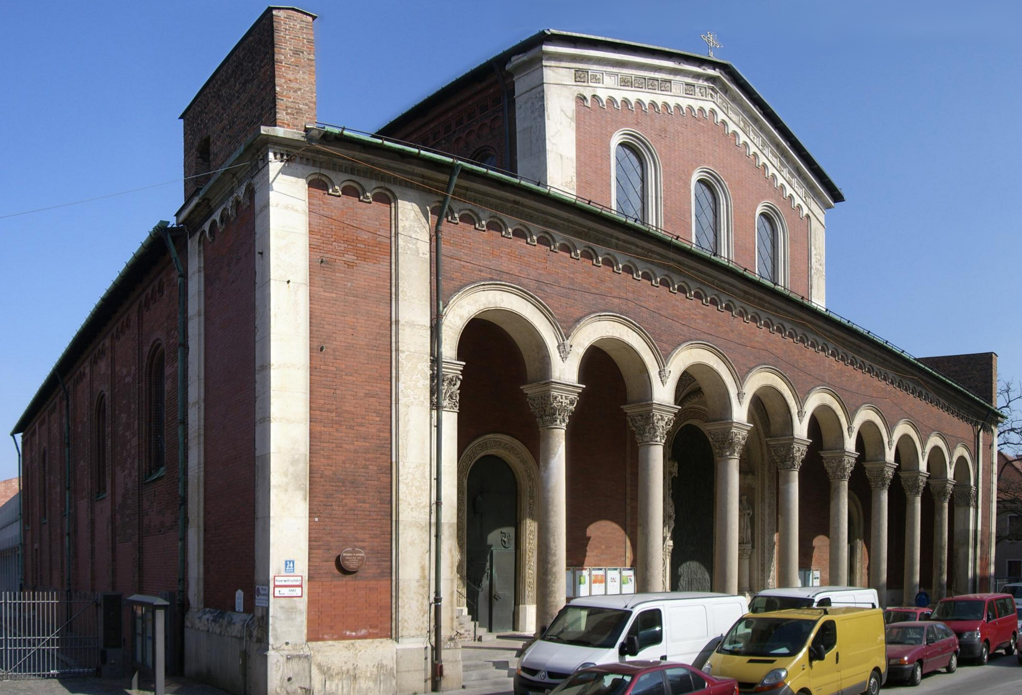 St. Bonifaz (Abteikirche)